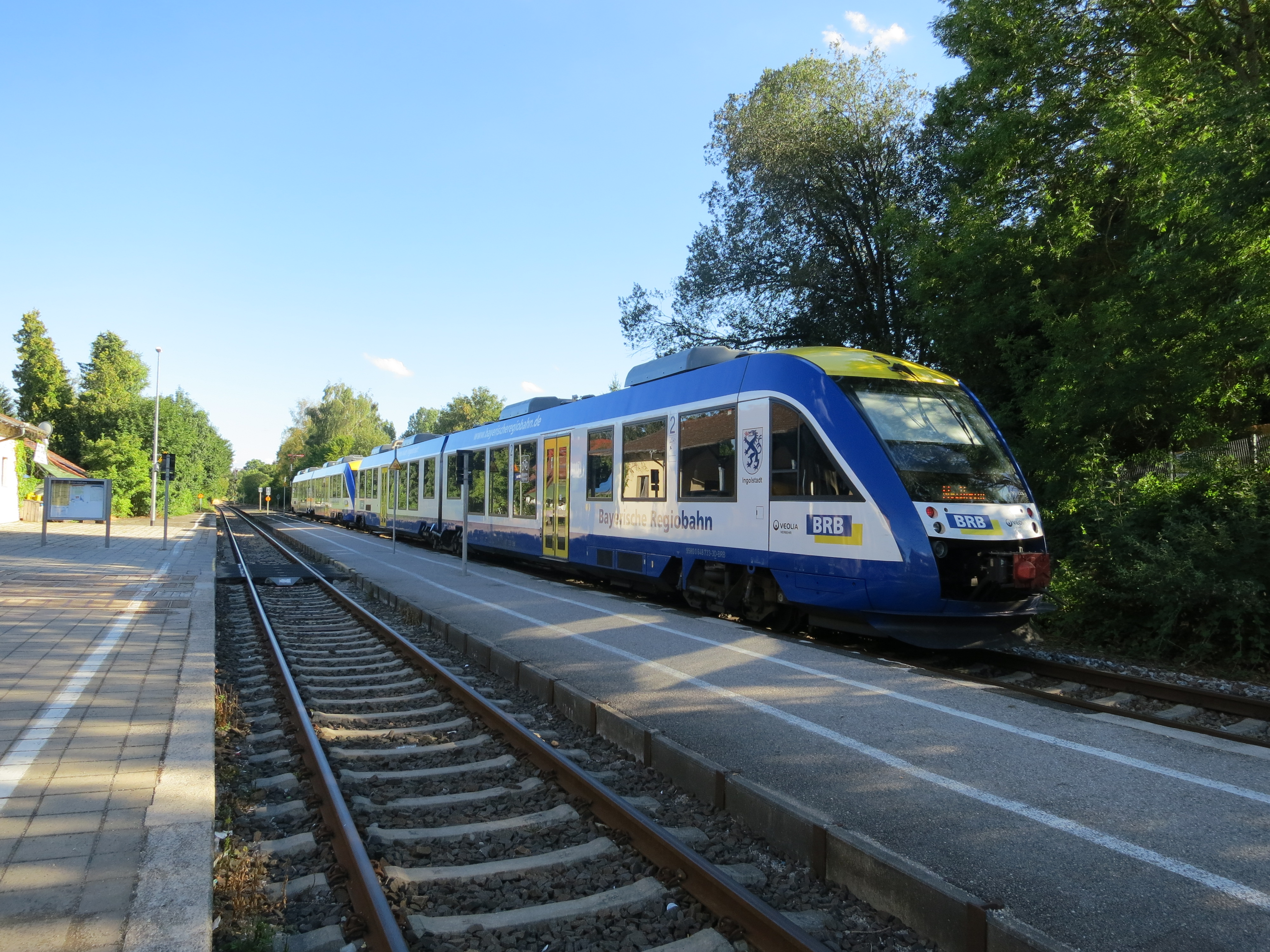 Triebwagen des Typs LINT 41 der BRB im Bahnhof Schondorf (Bay)